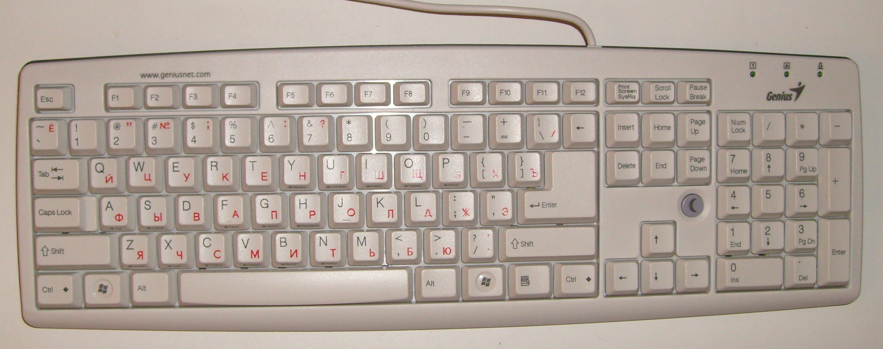 Клавиатура Genius с русской раскладкой ЙЦУКЕН и английской QWERTY